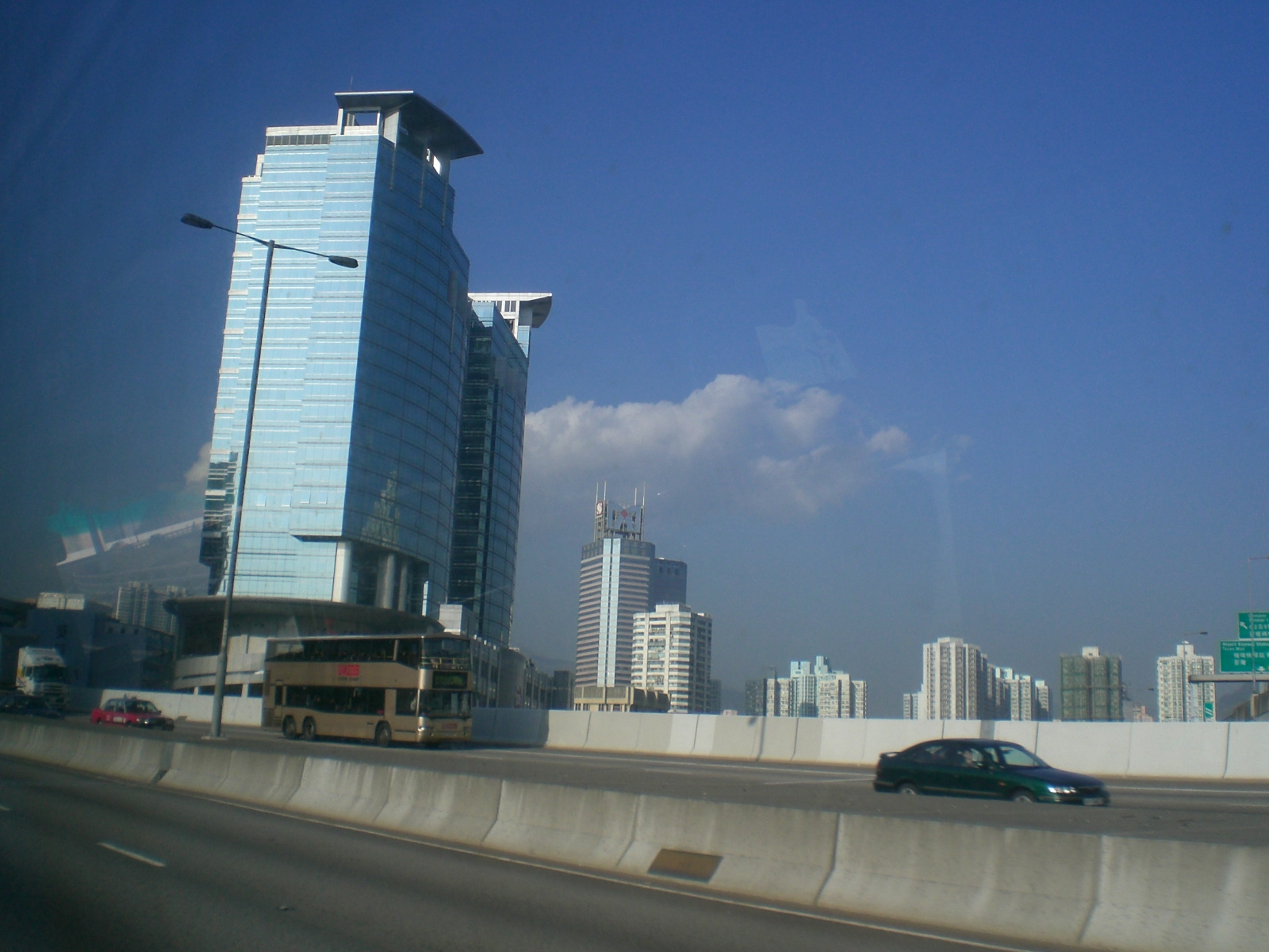 香港青葵公路北望車外沿途建築物